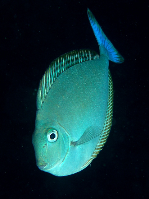 テングハギモドキ Naso hexacanthus